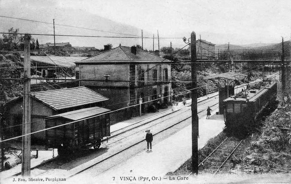 L'intérieur de la gare de Vinça, au début des années 1910 après l'électification par la compagnie du Midi.